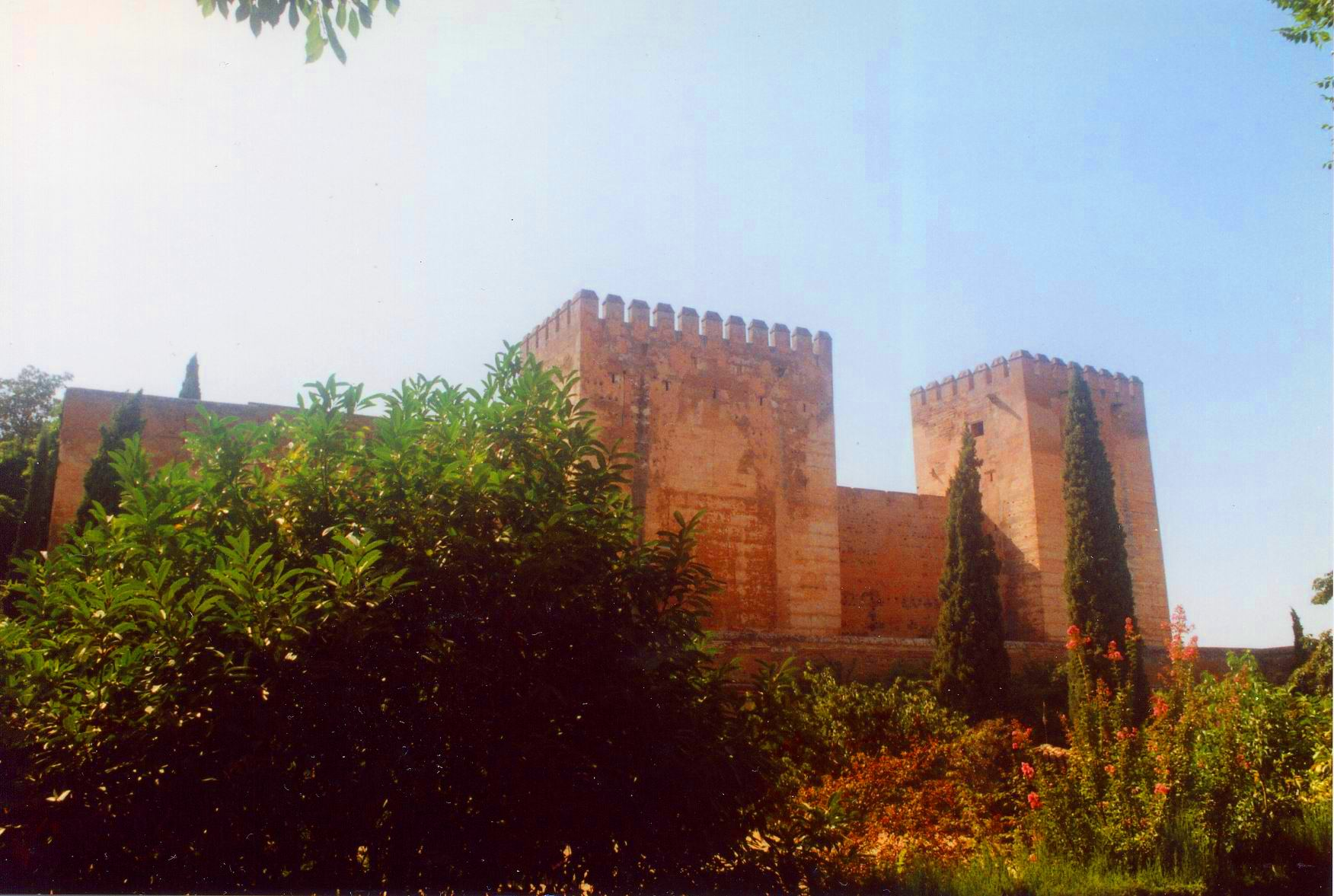 Alhambra y Generalife_UNIQ6d01b2e55d065416-ref-00000021-QINU_